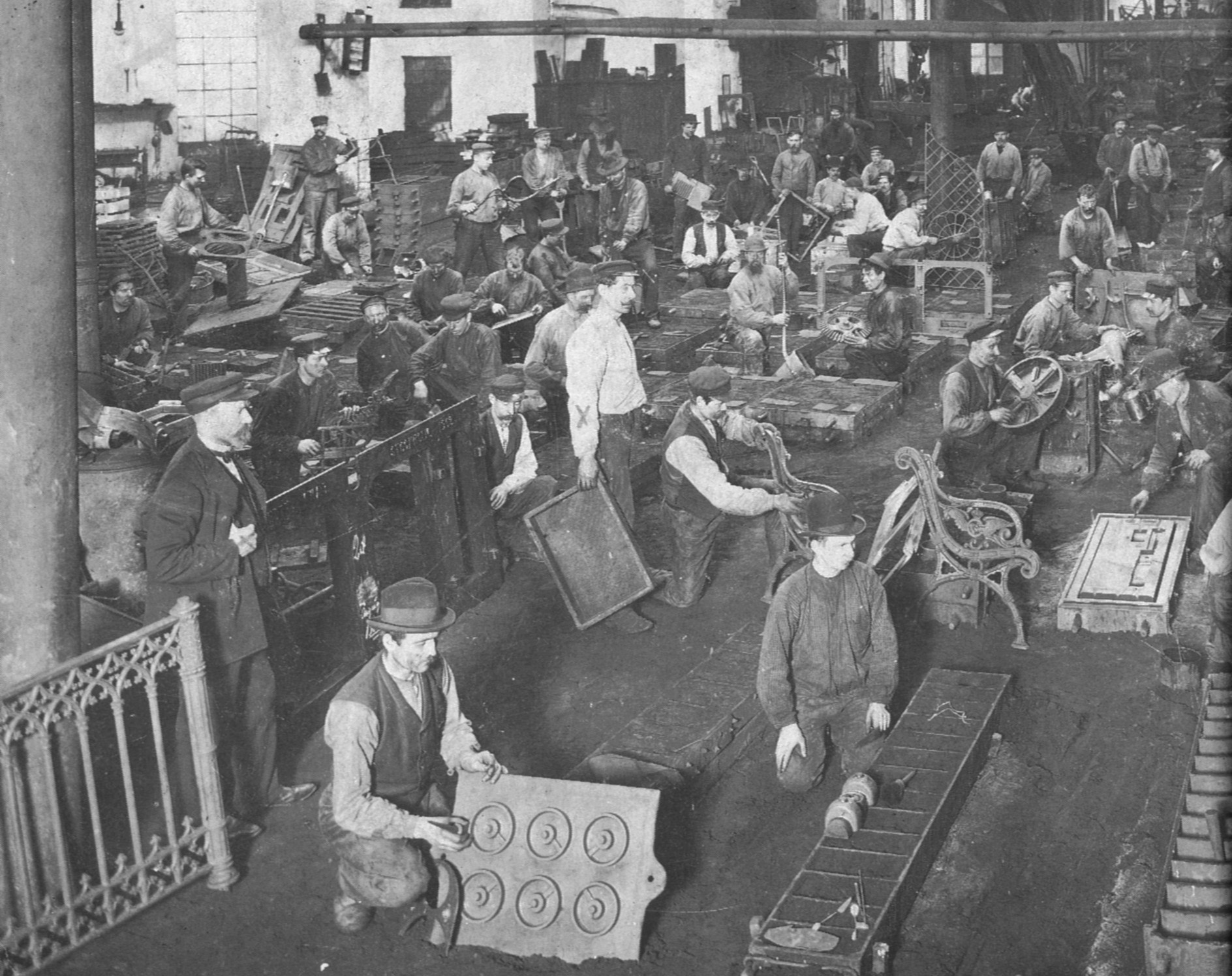 Gjutare i Bolinders Mekaniska Verkstads vid Klara sjö på Kungsholmen i Stockholm.